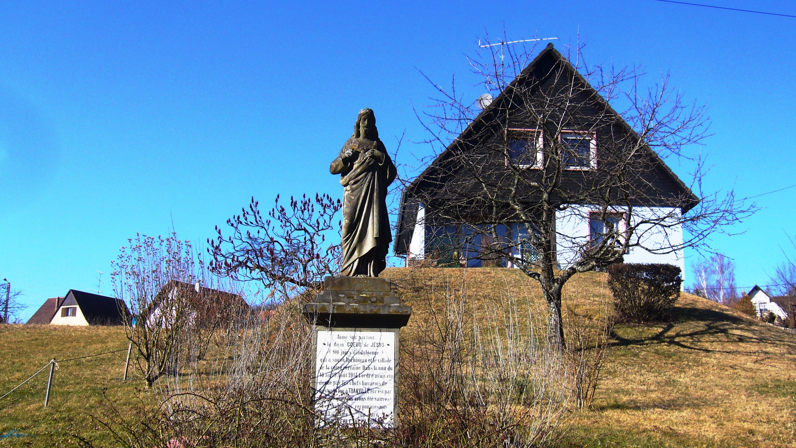 Statue du Sacré Coeur, Thanvillé